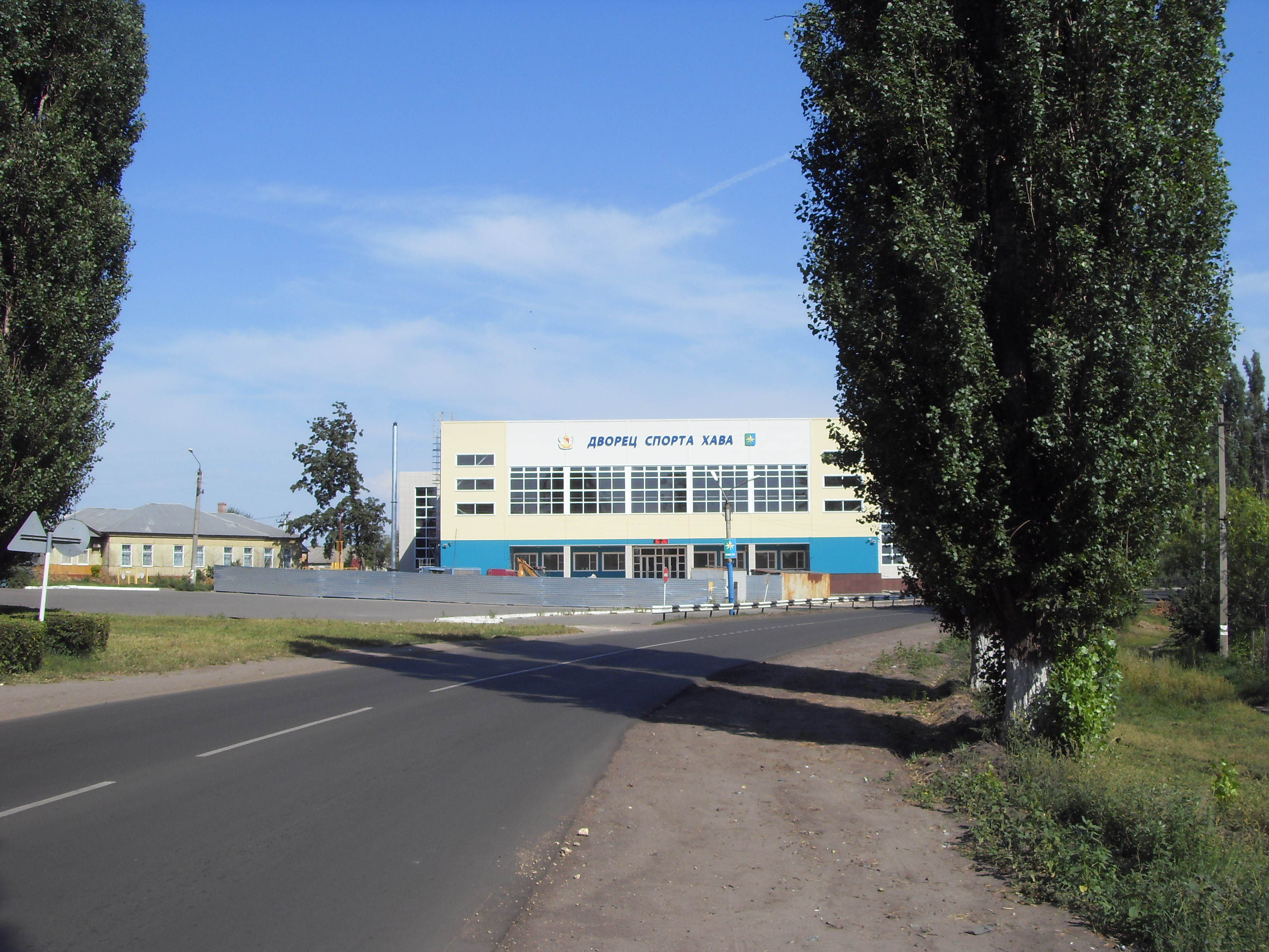 Verkhnyaya Khava, Voronezhskaya oblast', Russia